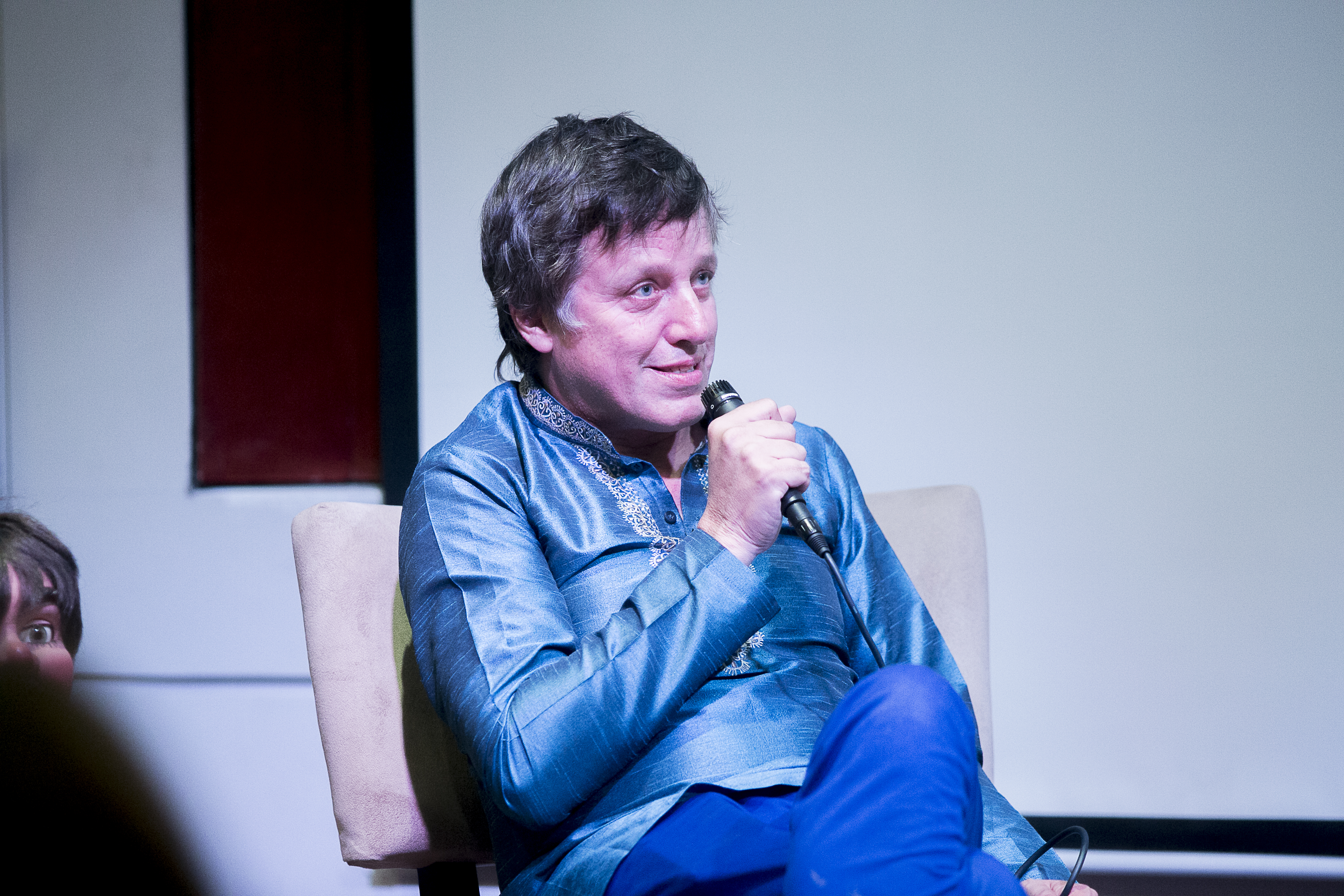 Conversatorio: Formas de novelar la crisis. Cuatro Premios Alfaguara conversan. Centro Cultural Pablo Antonio Cuadra / Hispamer. Managua, Nicaragua.